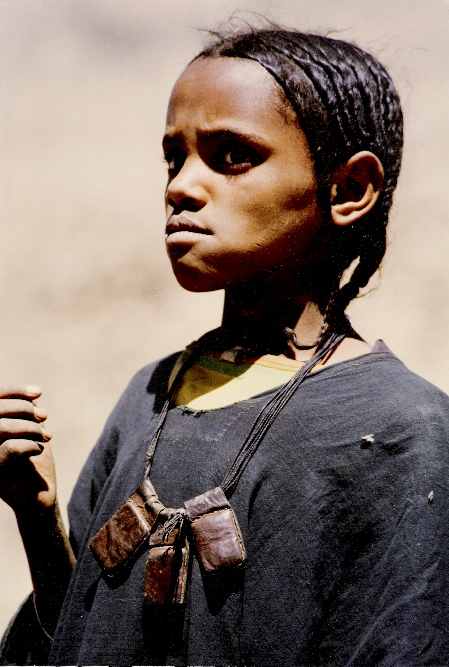 Targia; algerische Sahara